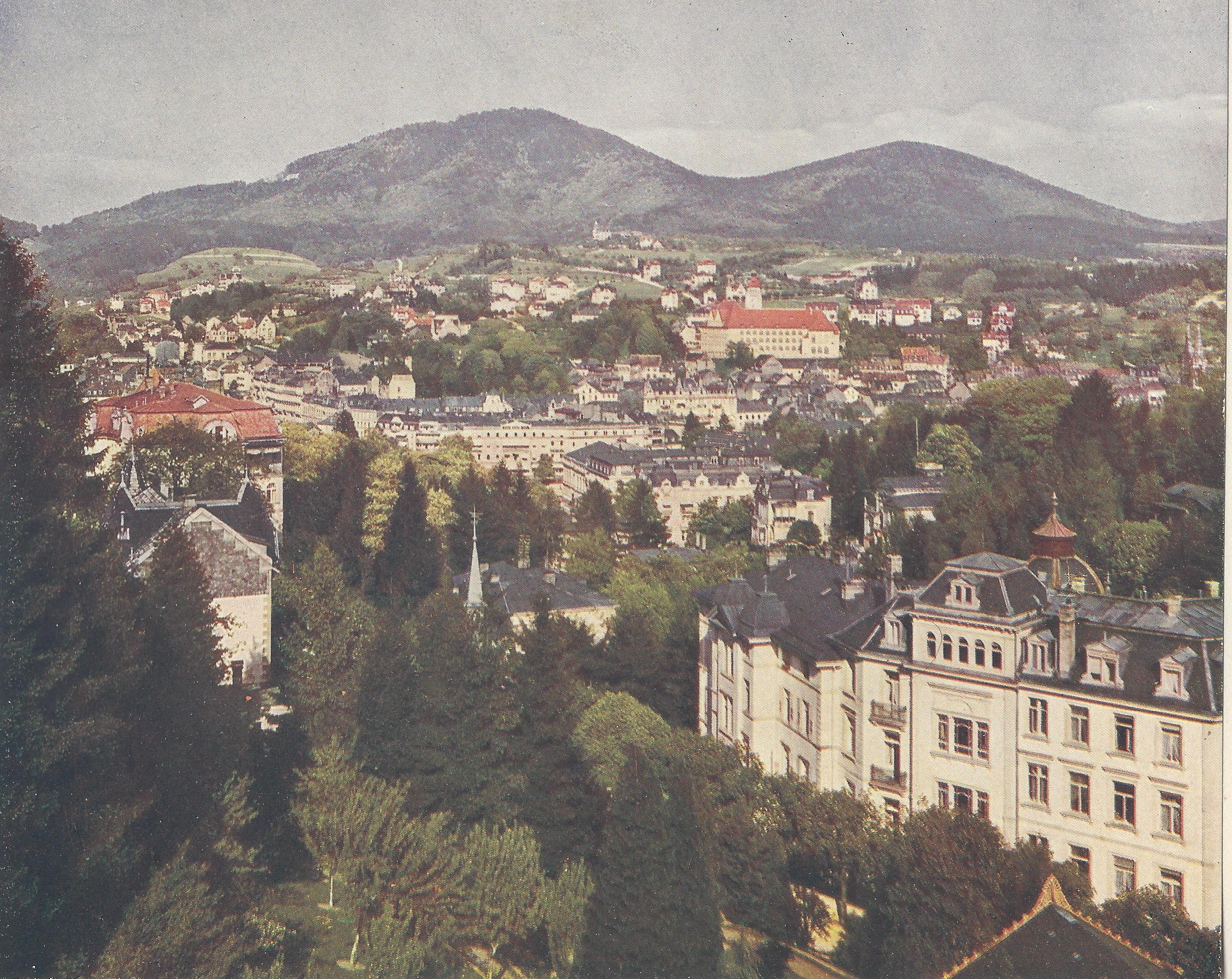 Farbfotografie nach den Autochromverfahren aus: Der Schwarzwald in Farbenphothographien, Wagner Freiburg 1910-1911, Tafel Nr. 5 Baden-Baden